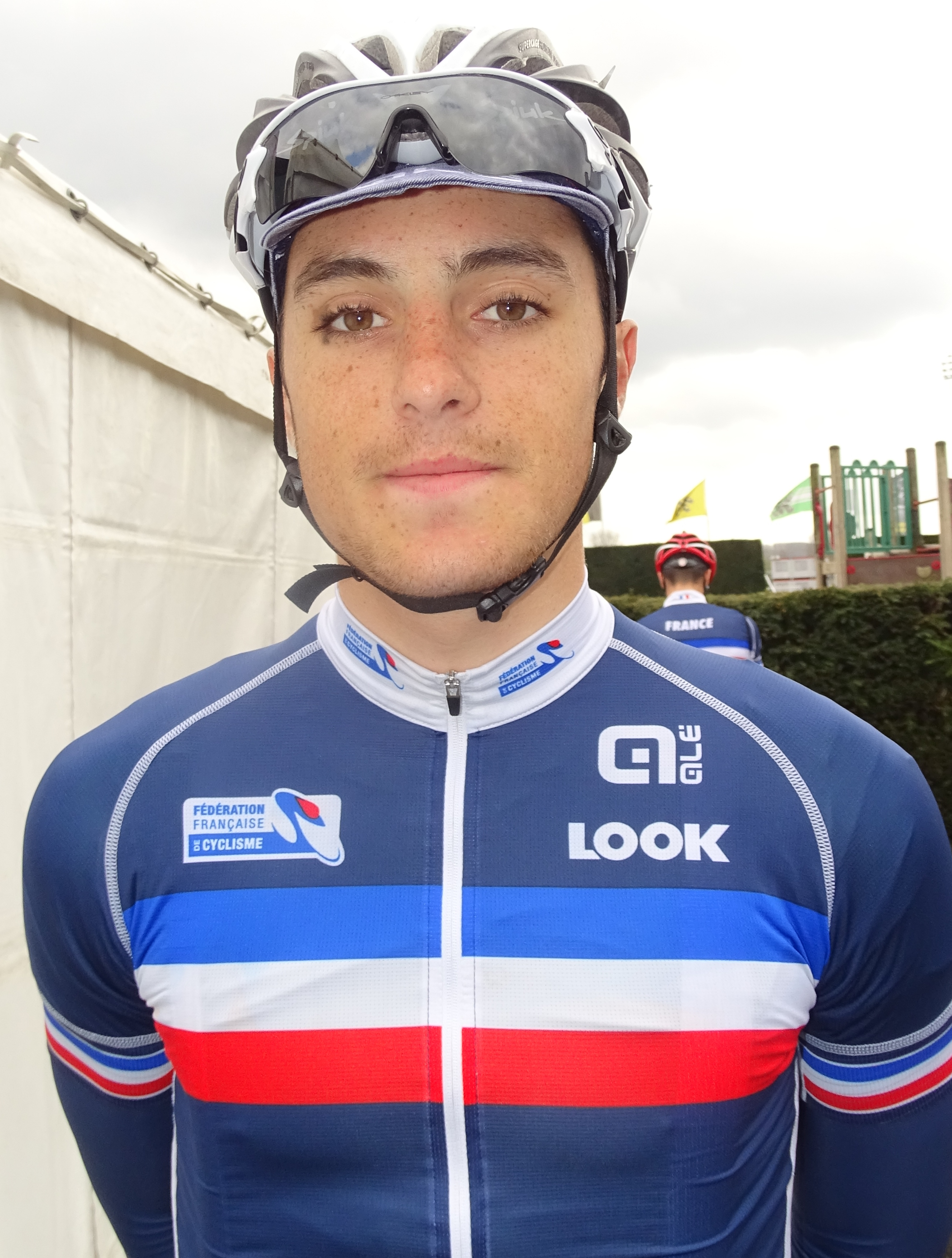 Reportage réalisé le samedi 11 avril à l'occasion du départ et de l'arrivée du Tour des Flandres espoirs 2015 à Audenarde, Belgique.